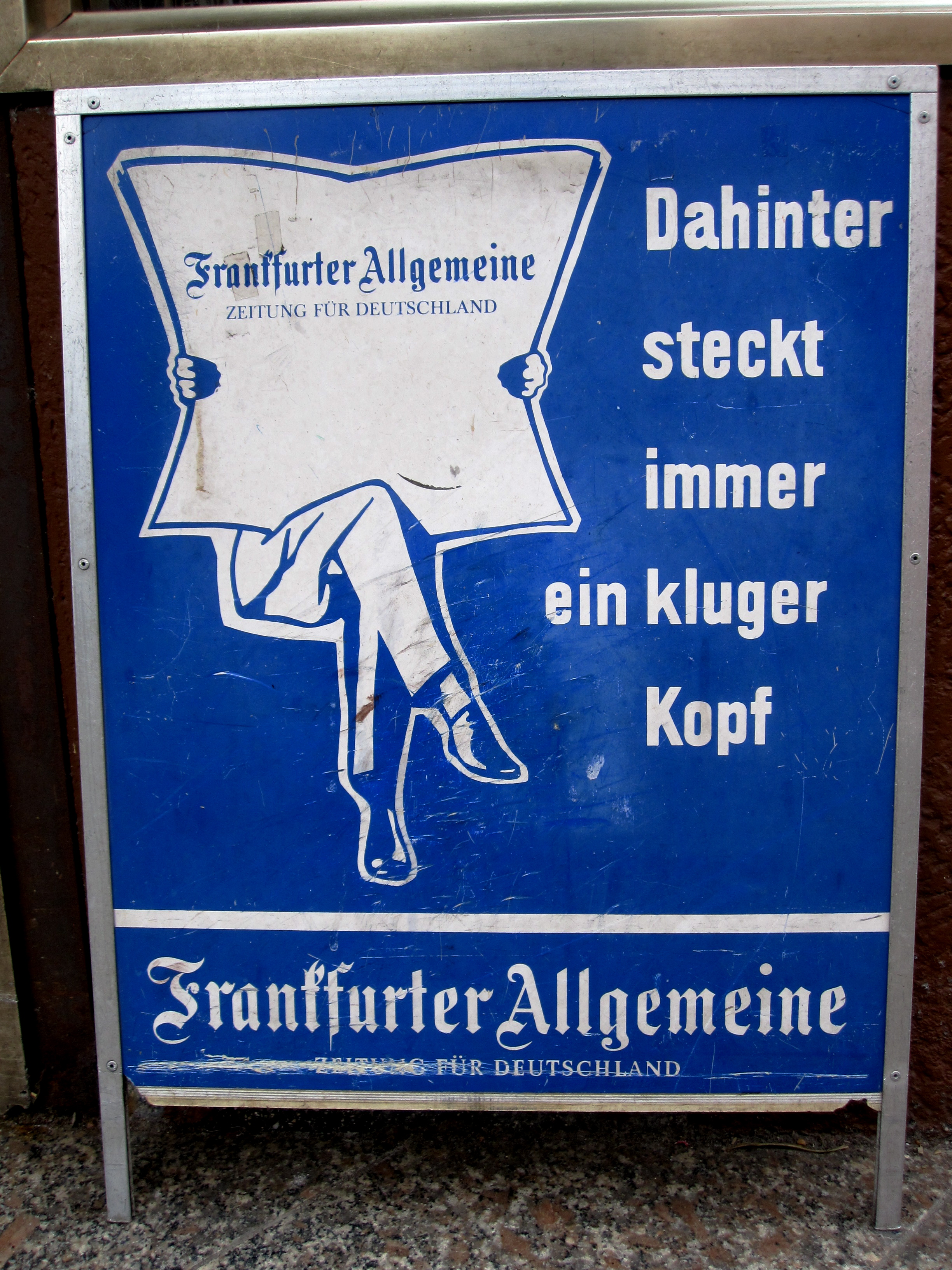 Werbespruch "Dahinter steckt immer ein kluger Kopf" der Frankfurter Allgemeine Zeitung